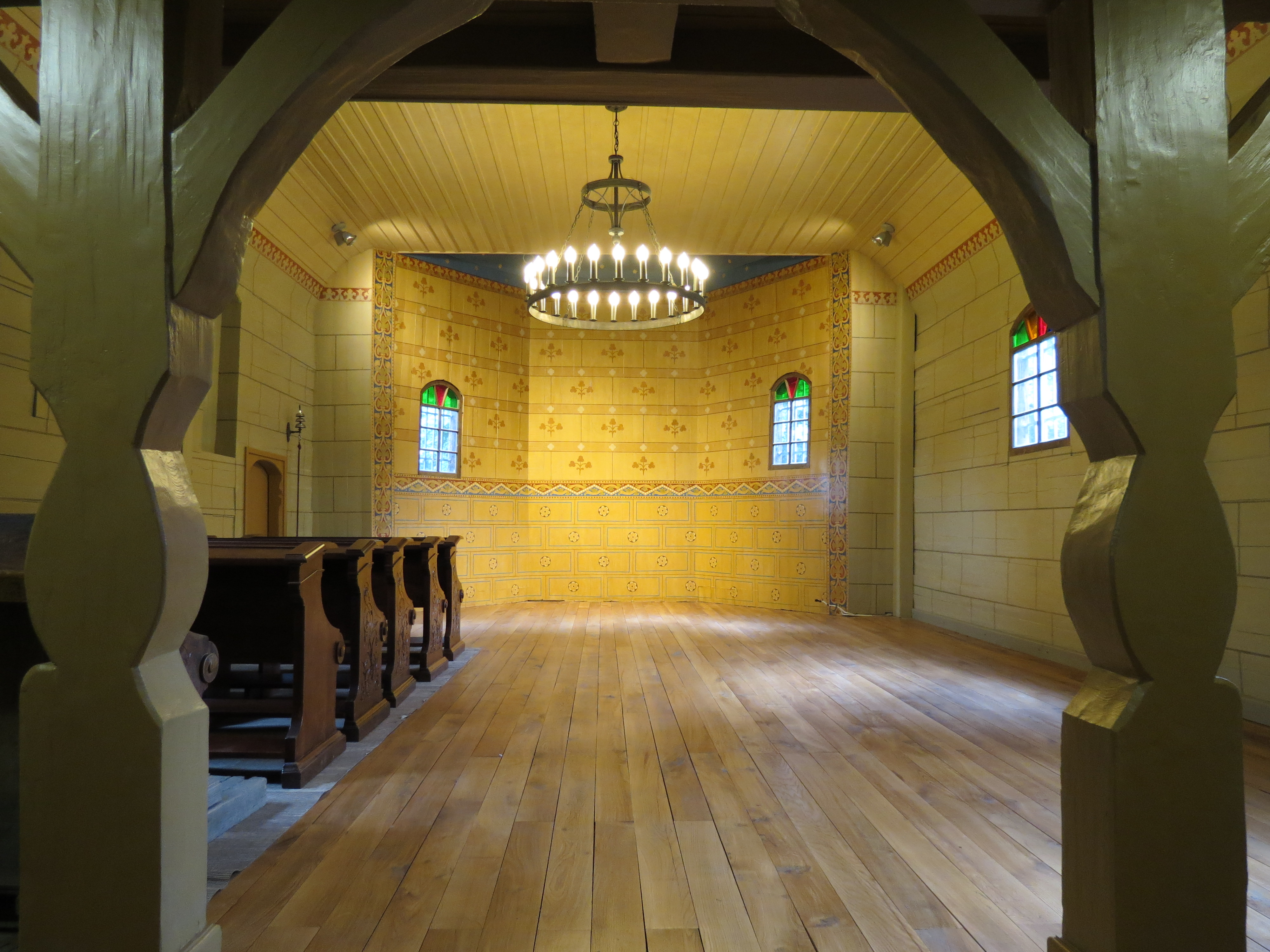 Smolnica, ul. Wiejska - dawna kaplica, obecnie kościół filialny p.w. św. Bartłomieja